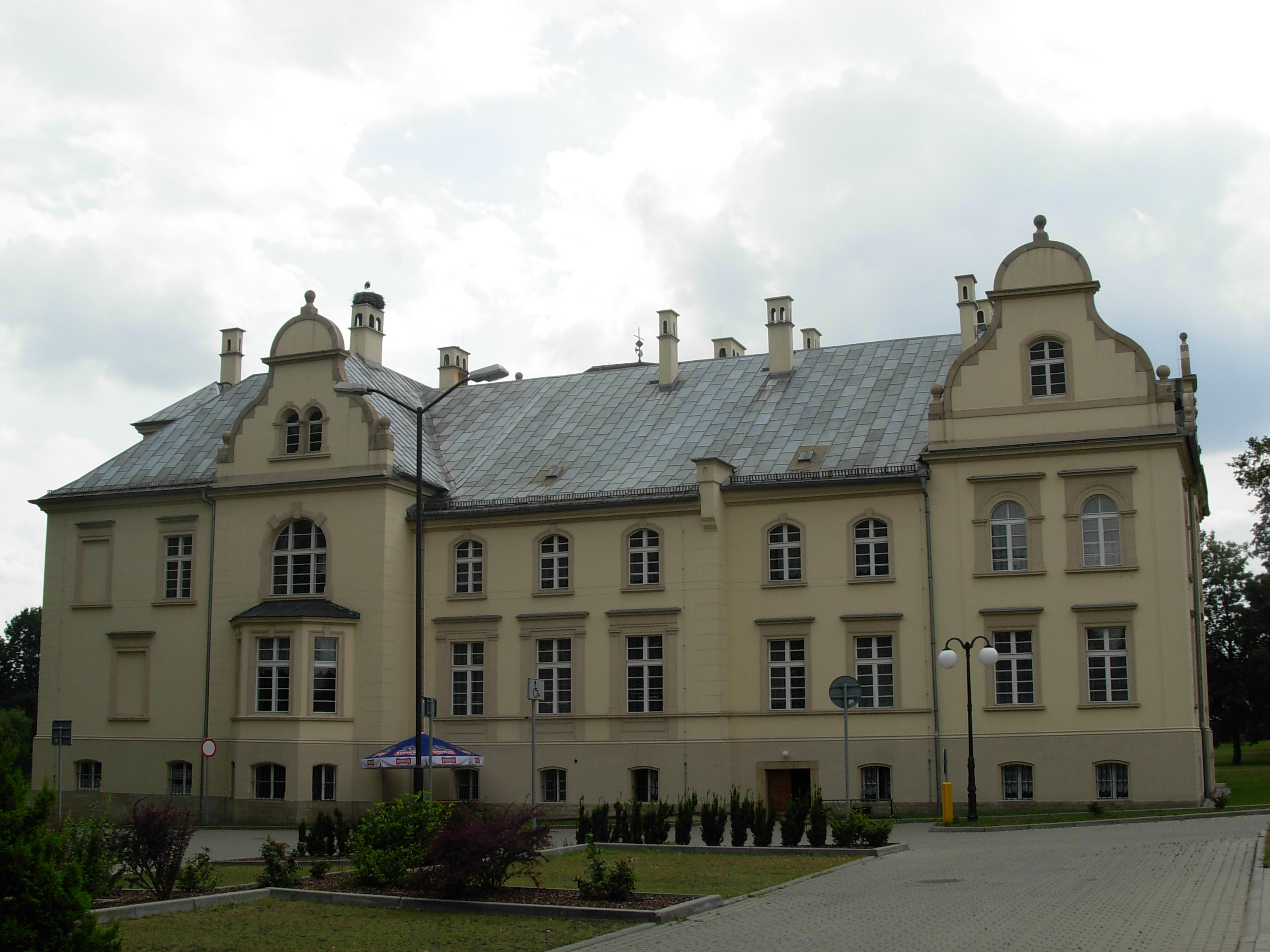 Dwór w Przyszowicach